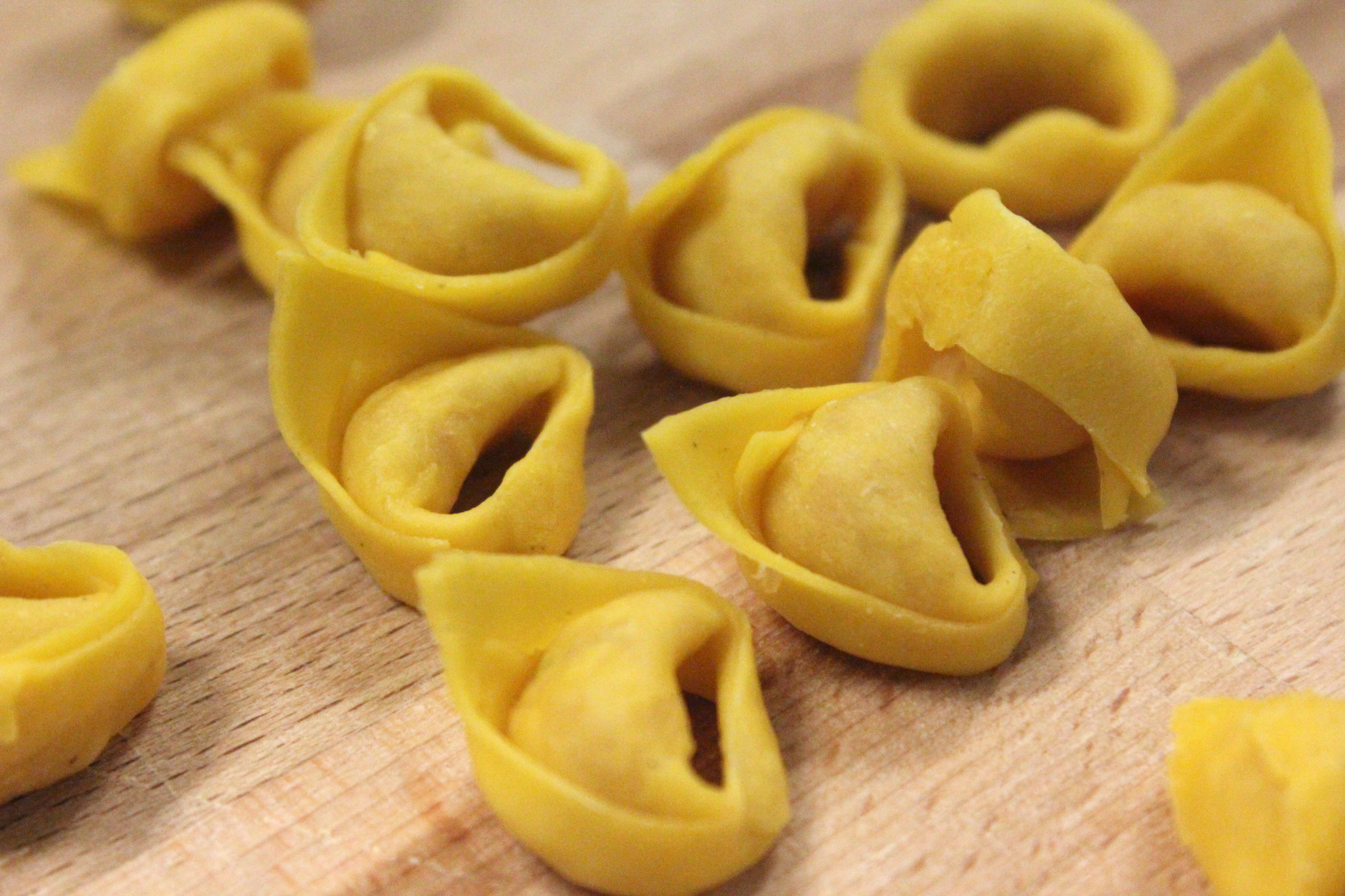 Alcuni tortellini Bolognesi sul piano di legno appena prodotti dalla sfoglina